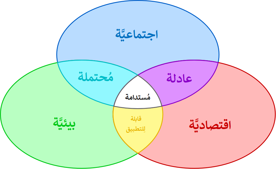 رسمٌ بياني يُوضح كيفيَّة تحقيق التنمية المُستدامة.